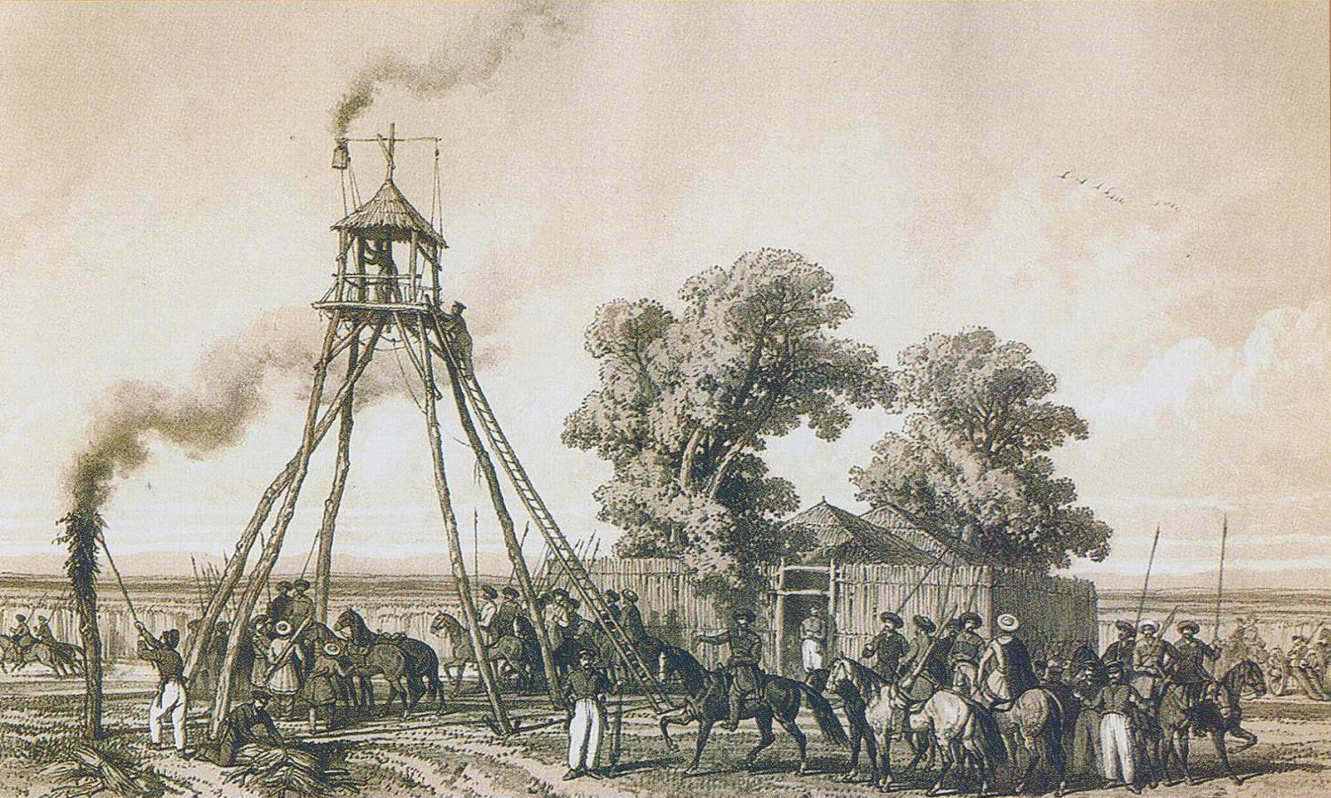 Казачий пост. Рис. К. Оммер де Гелль.